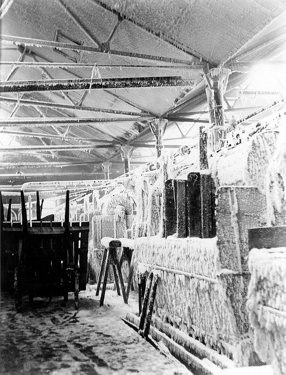 Ein Heizungsausfall während des strengen Winters 1939/1940 verwandelte die Fabrikhallen der Georg Schleber AG in Reichenbach im Vogtland am 13. Januar 1940 in eine Eislandschaft